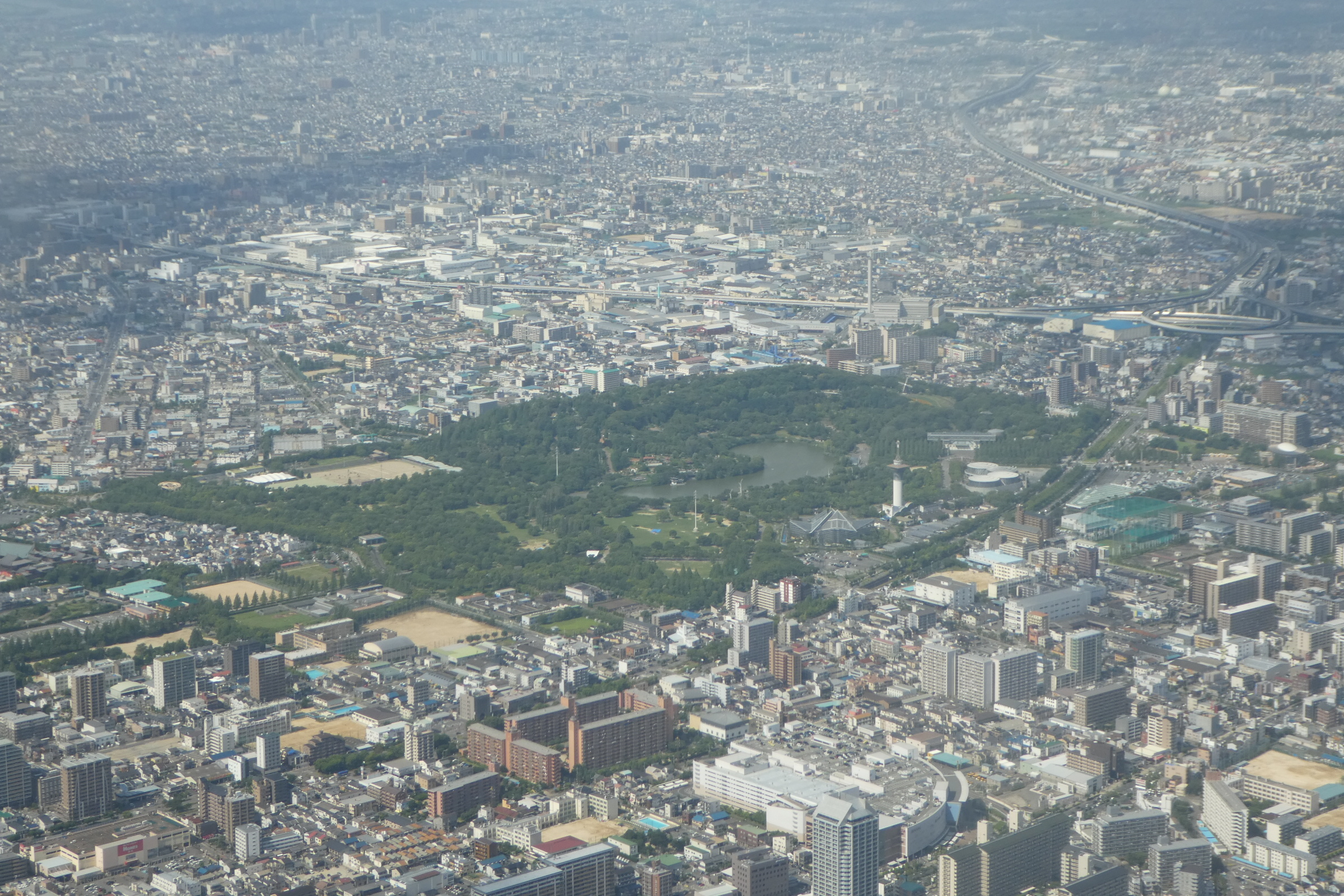 上空から見た花博記念公園鶴見緑地